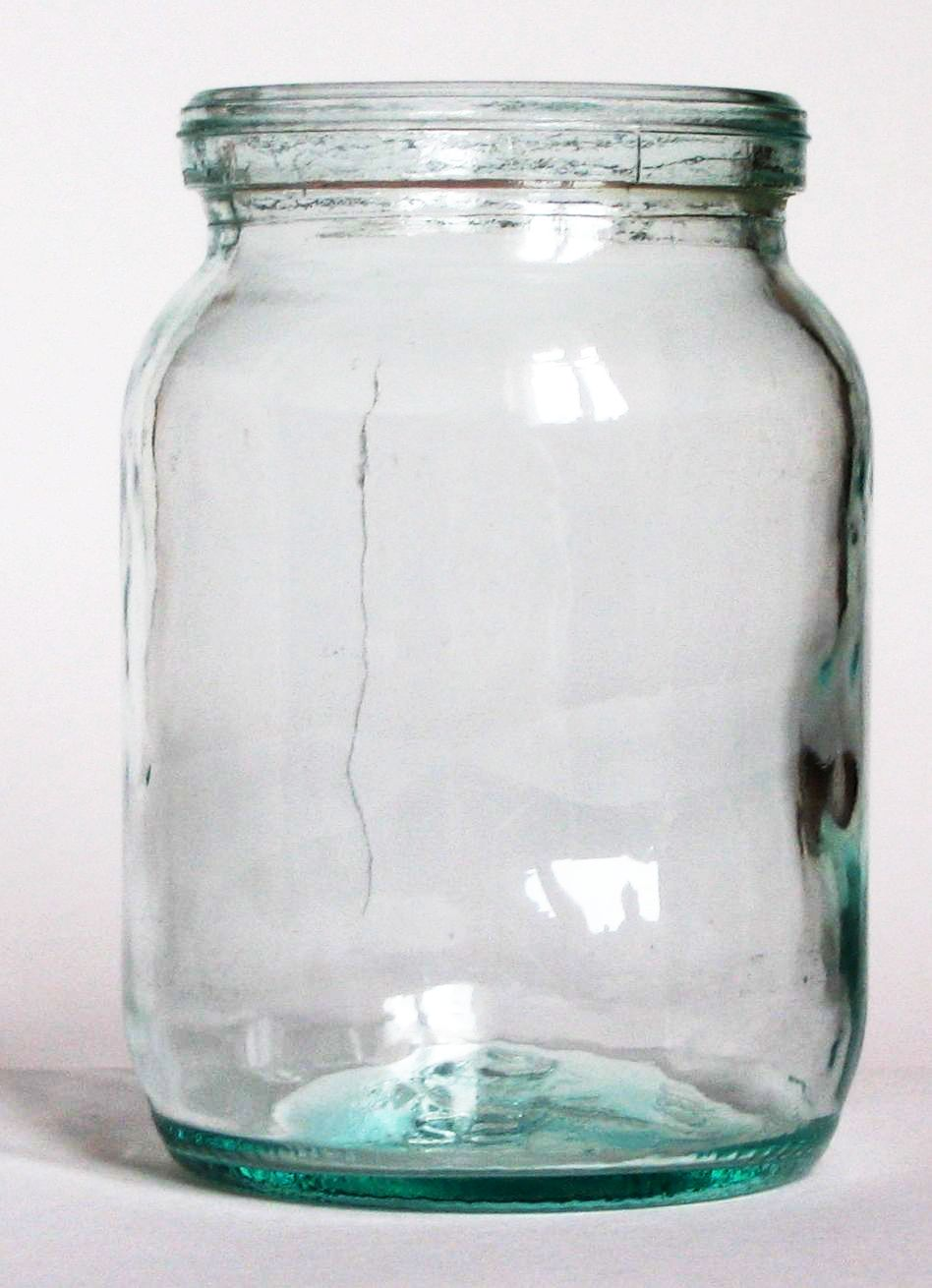 Soviet mayonnaise jar 250 ml